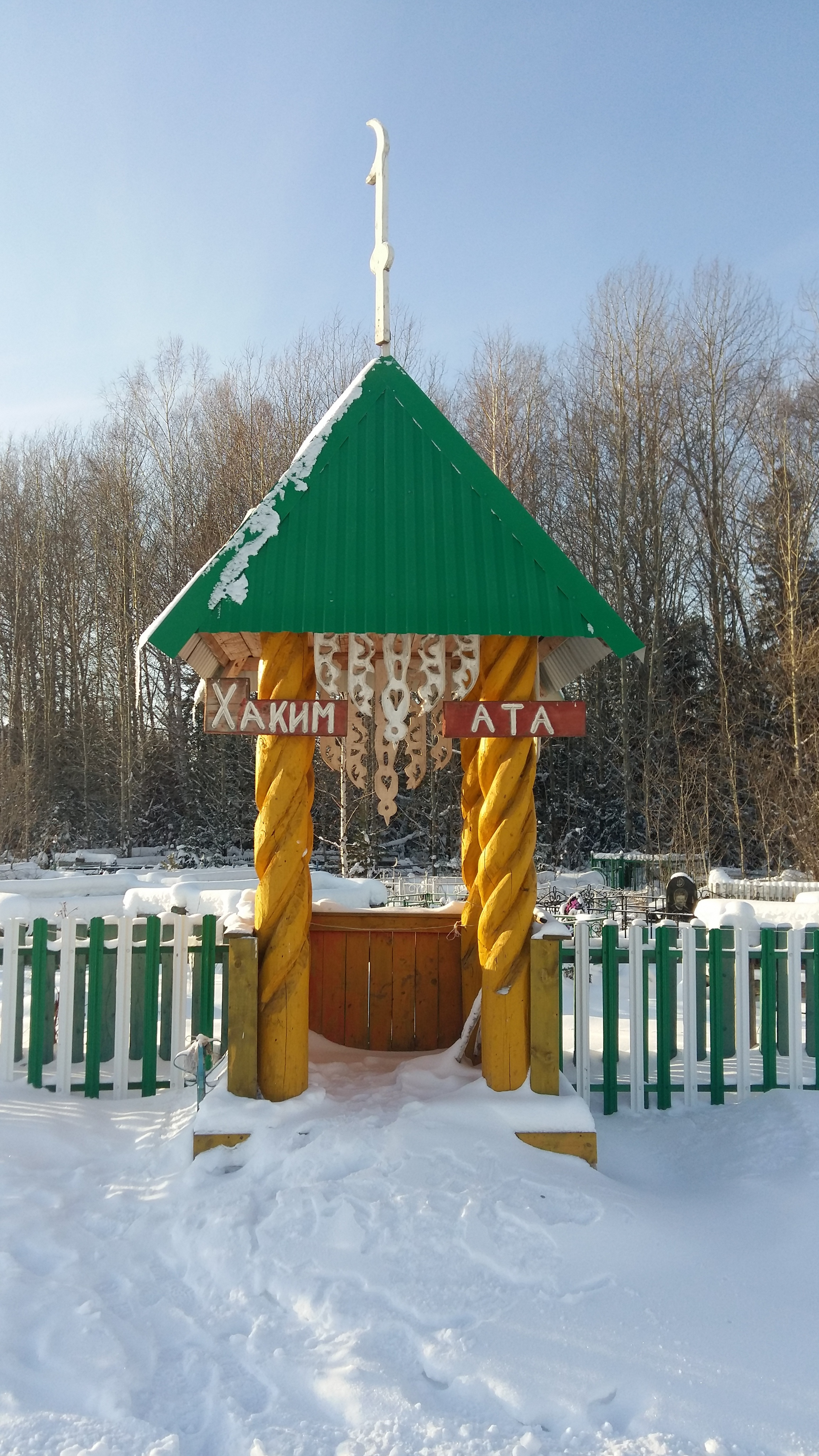 Место для пожертвований (садака) посетителей астаны на Баишевском кладбище.